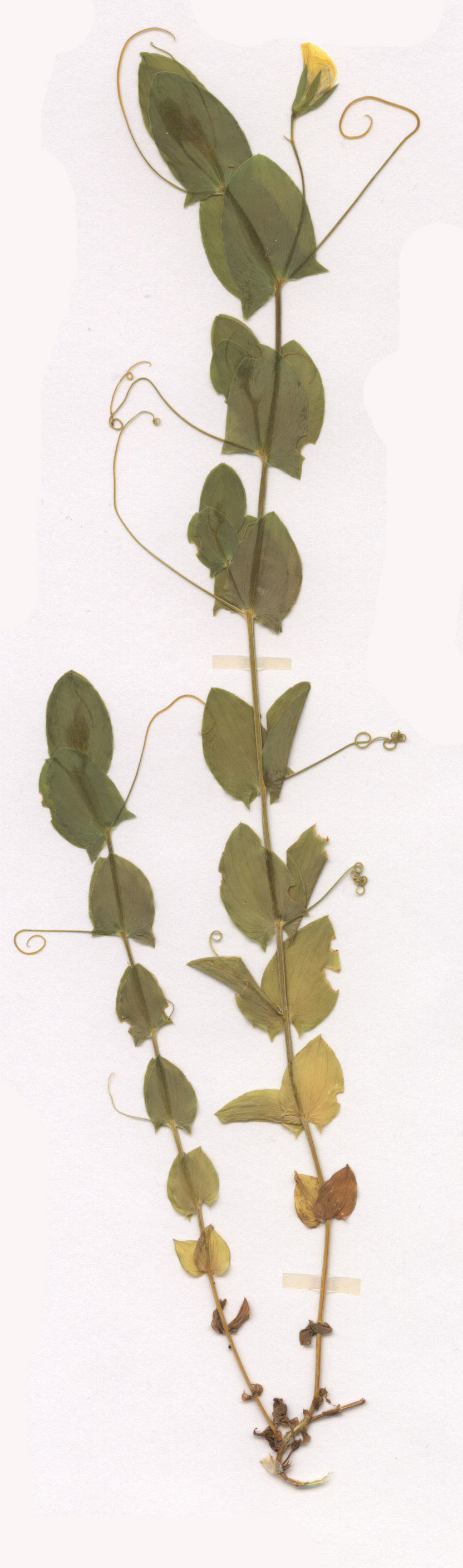 Lathyrus aphaca, eigener Herbarbeleg